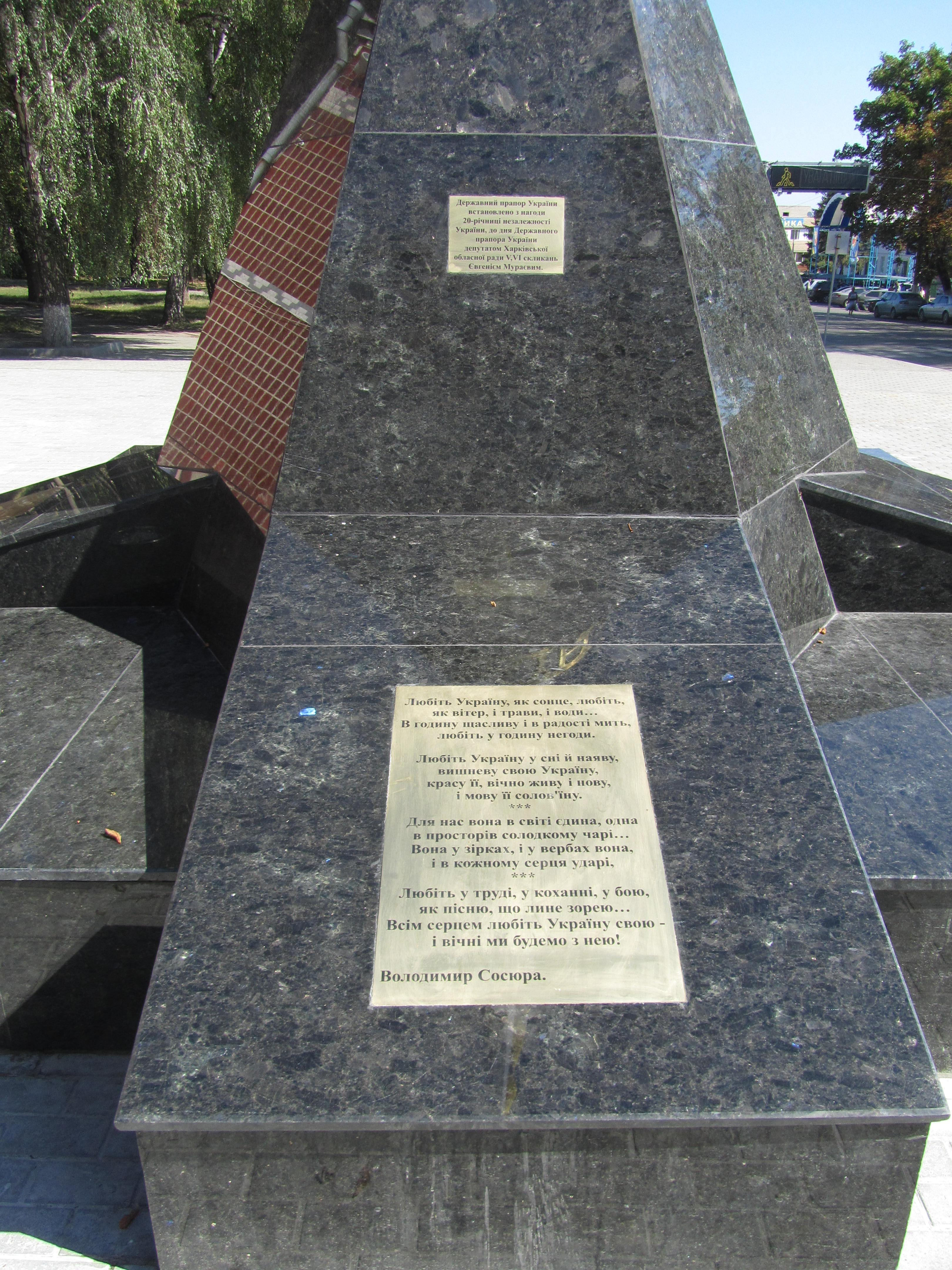 Зміїв державний прапор України - Присвята